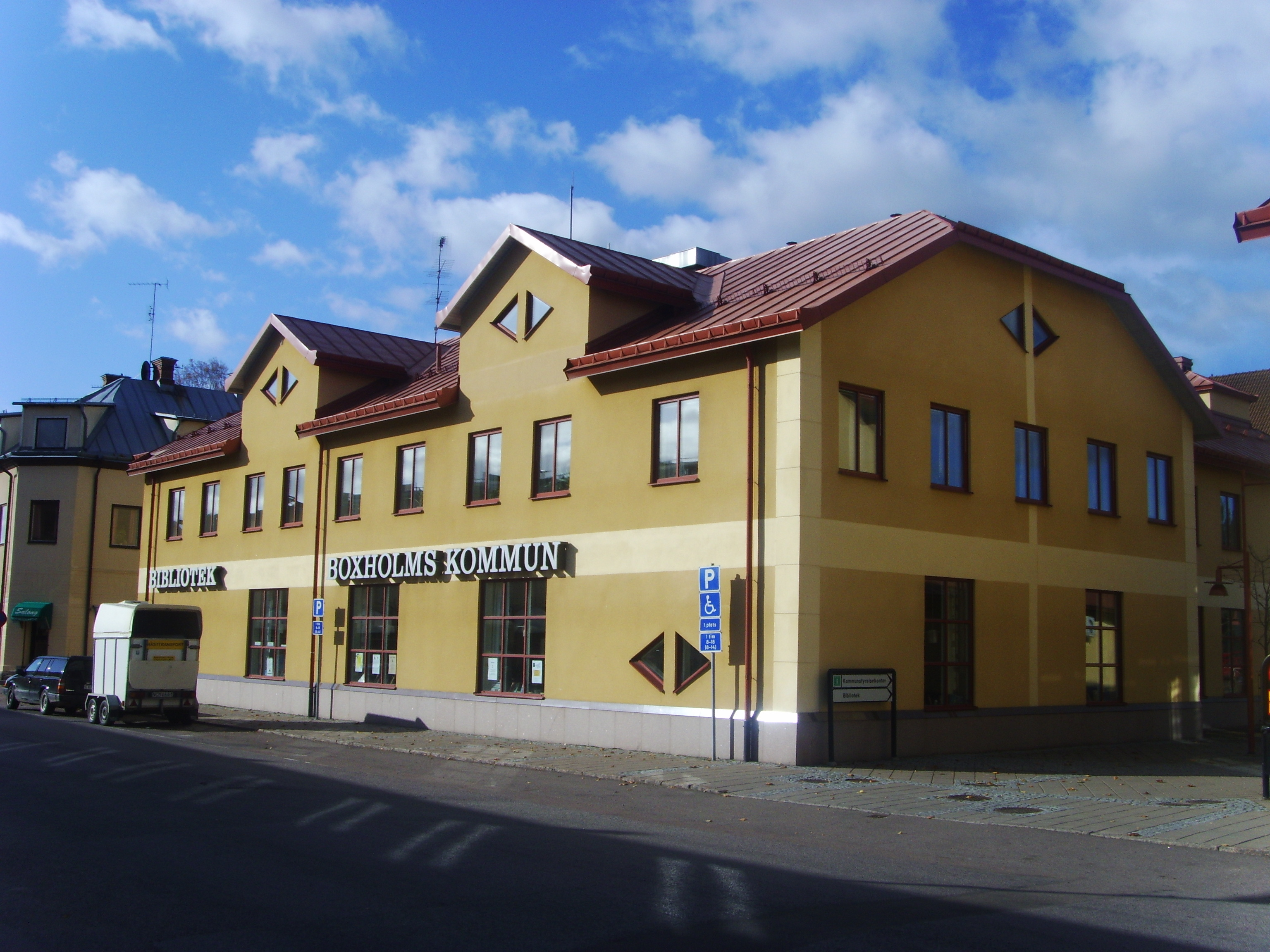 Kommunhuset och huvudbiblioteket i Boxholm.